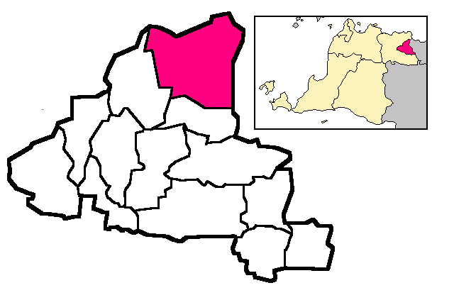 Emplacement du kecamatan de Benda dans la ville de Tangerang, Banten, Indonésie